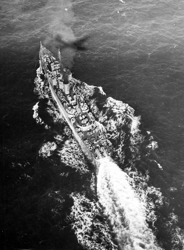 Fragata ARA Hércules (P-31)». El vista del aire